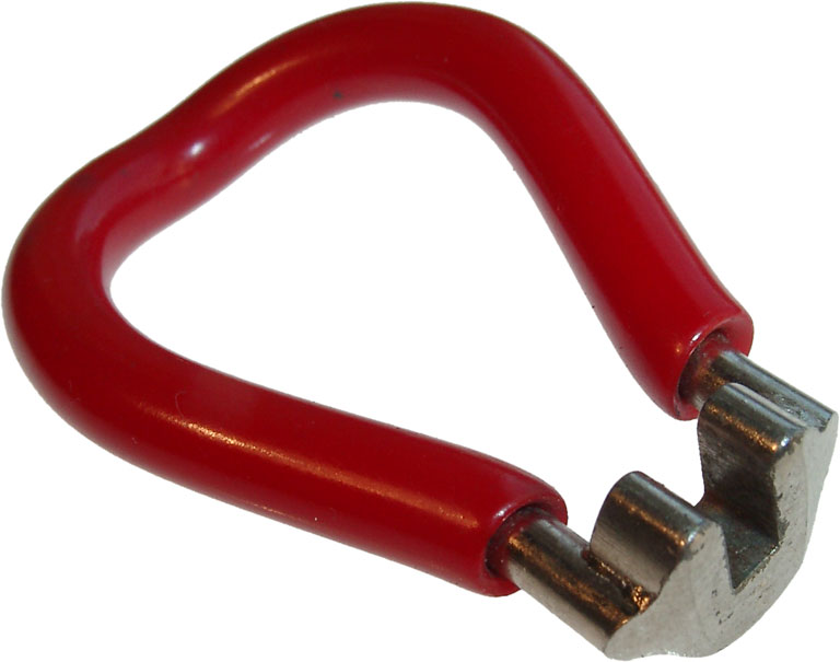 Motiv: Speichenschlüssel der Firma Park Tool. Mit diesem Speichenschlüssel kann die Speichenspannung in einem Speichenrad (Fahrrad-Laufrad) geändert werden. Fotograf: KMJ Aufnahmedatum: 2004-06-19 Aufnahmeort: Studio Bildname: Speichenschluessel_01_KMJ.jpg Bildgröße: 768 Pixel x 605 Pixel (45.679 Bytes)